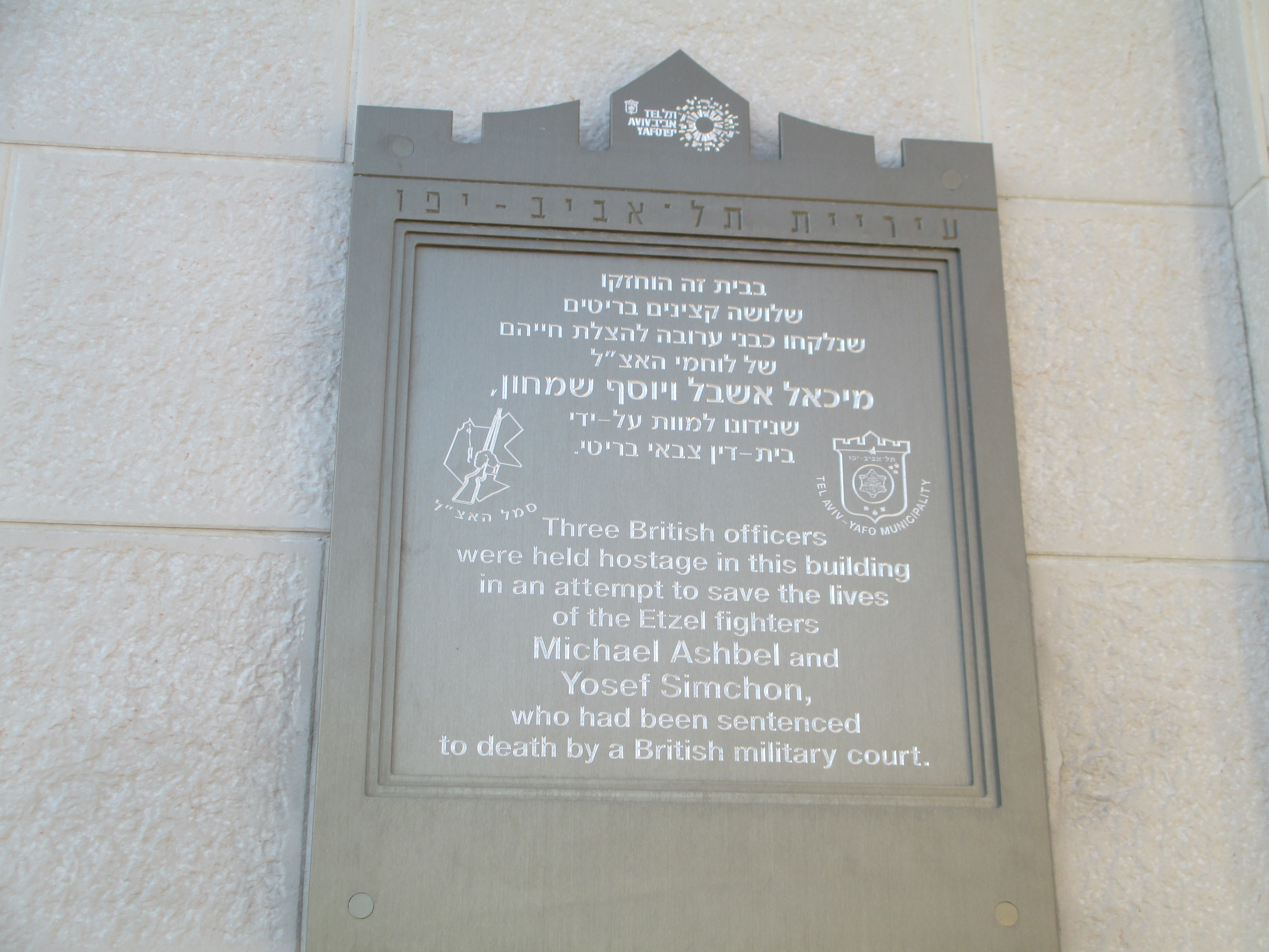 לוחית זיכרון על הבית בו החזיק האצ"ל בשלושה קצינים בריטים בתגובה לעונש המוות לאשבל ושמחון, דרך שלמה 162 בתל אביב.